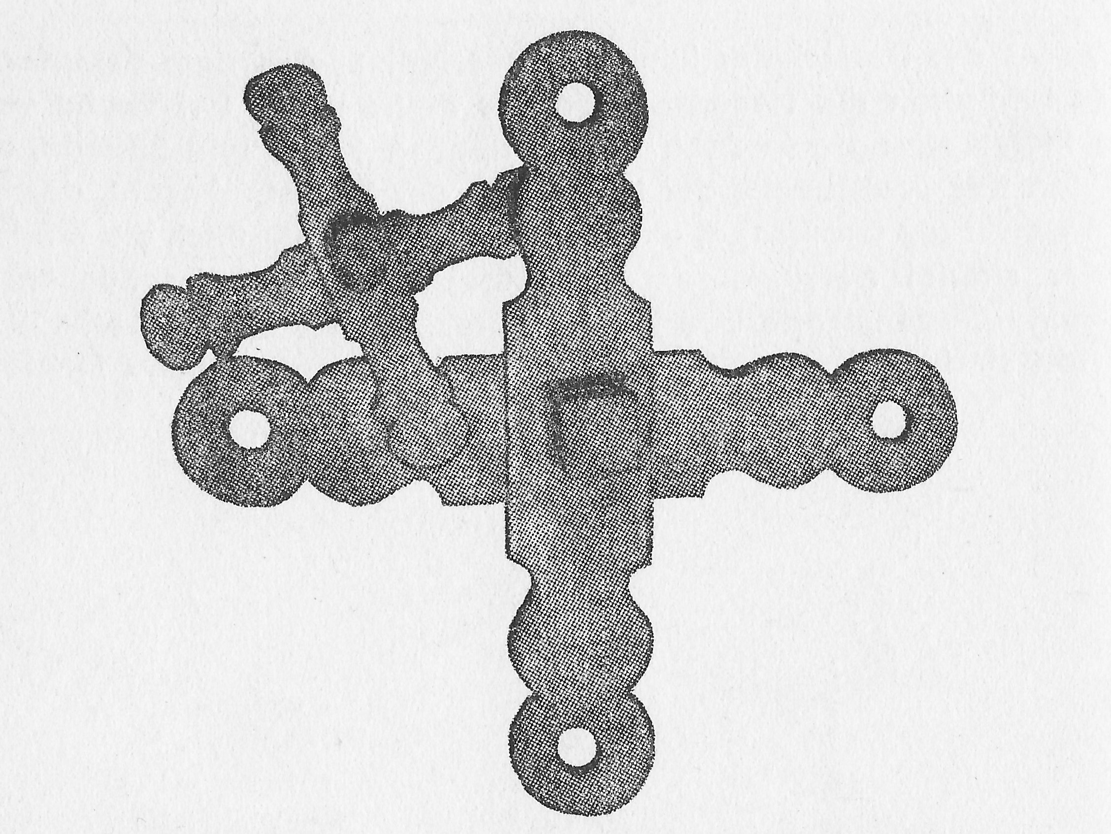 Hölzerne Schwimmer (Wasserkreuze) (Heimatmuseum des Kreises Calbe, Schönebeck/Elbe), 1935 oder früher, Das Bild wurde 1935 im Buch von Eduard Stegmann, Aus dem Volks- und Brauchtum Magdeburgs und der Börde, Magdeburger Kultur- und Wirtschaftsleben Nr. 4, Herausgegeben von der Stadt Magdeburg, Seite 50 veröffentlicht